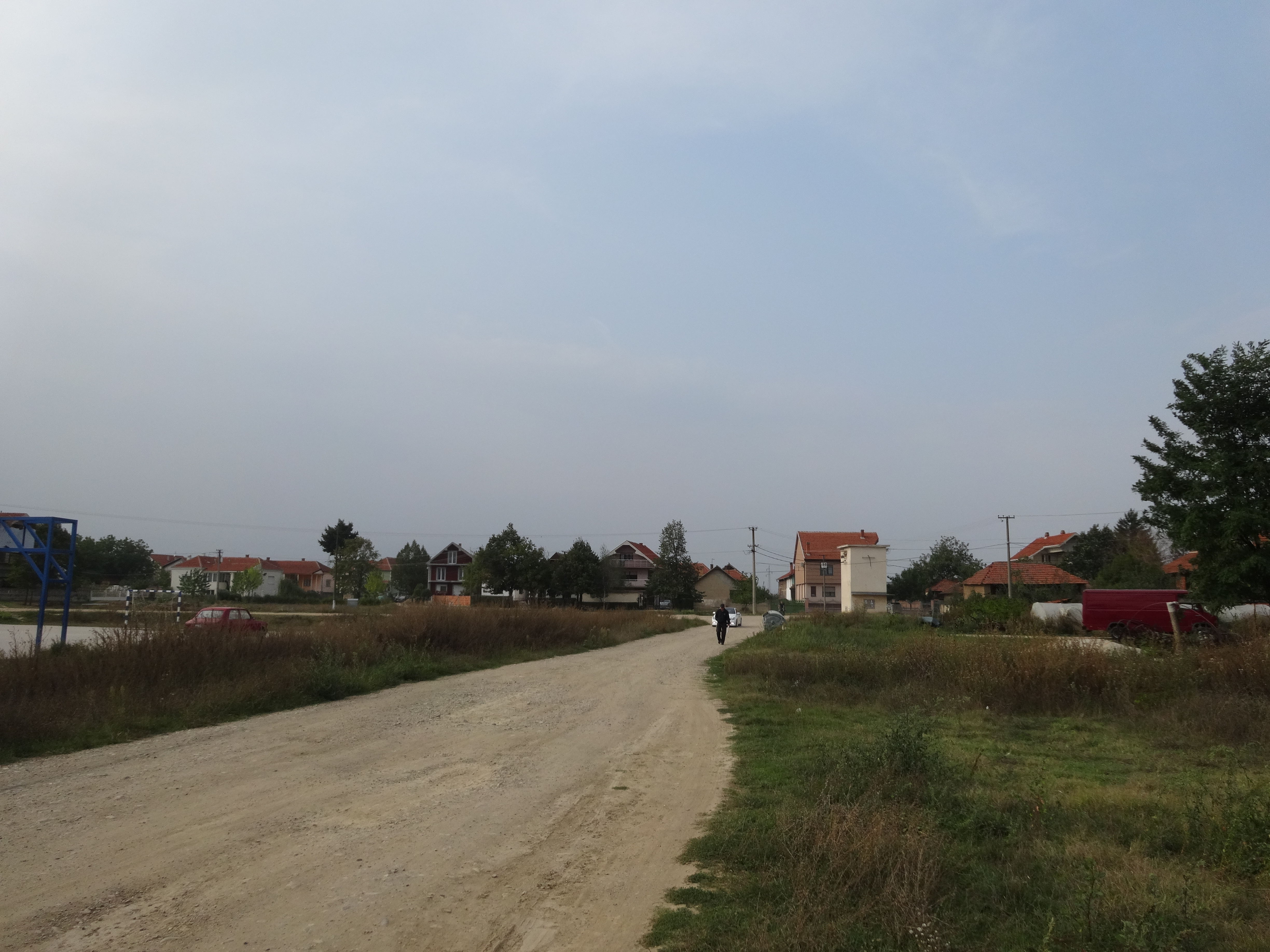 Mrštane, Leskovac